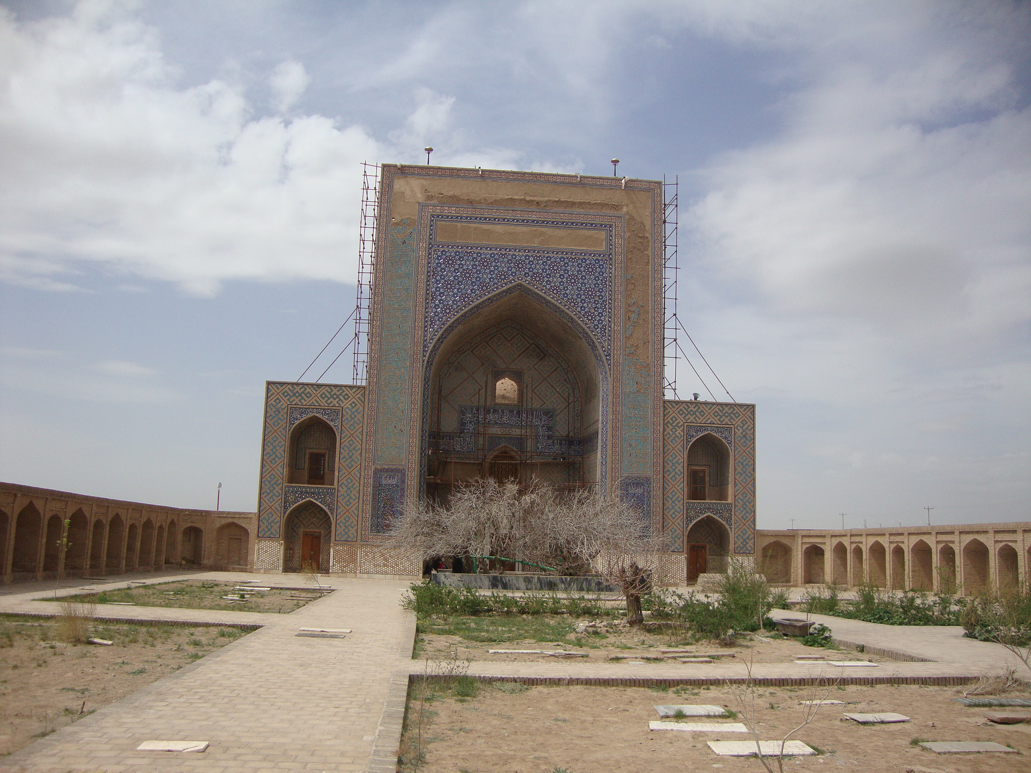 مزار و مسجد مولانا ابوبکر تایبادی در شهرستان تایباد